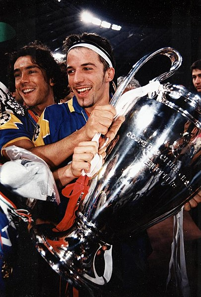 Roma, stadio Olimpico, 22 maggio 1996. I calciatori Alessandro Del Piero (in primo piano) e Paulo Sousa (in secondo piano) festeggiano il successo della Juventus nella UEFA Champions League 1995-1996 al termine della vittoriosa finale contro l'Ajax (1-1 d.t.s., 4-2 d.c.r.). Nell'occasione i giocatori juventini indossano la seconda divisa dell'epoca del club bianconero, blu con dettagli gialli.